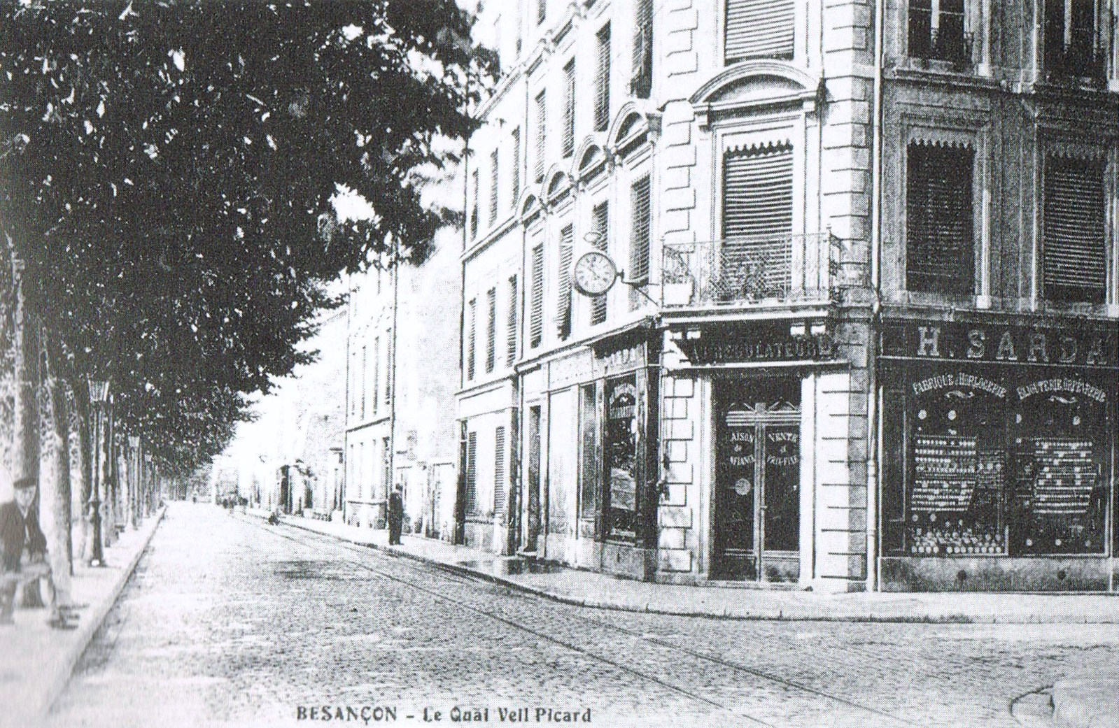 L'hologerie Sarda, à Besançon (Doubs, France).